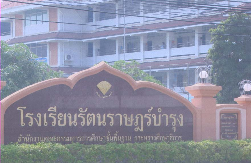 ภาพโรงเรียนรัตนราษฎร์บำรุง